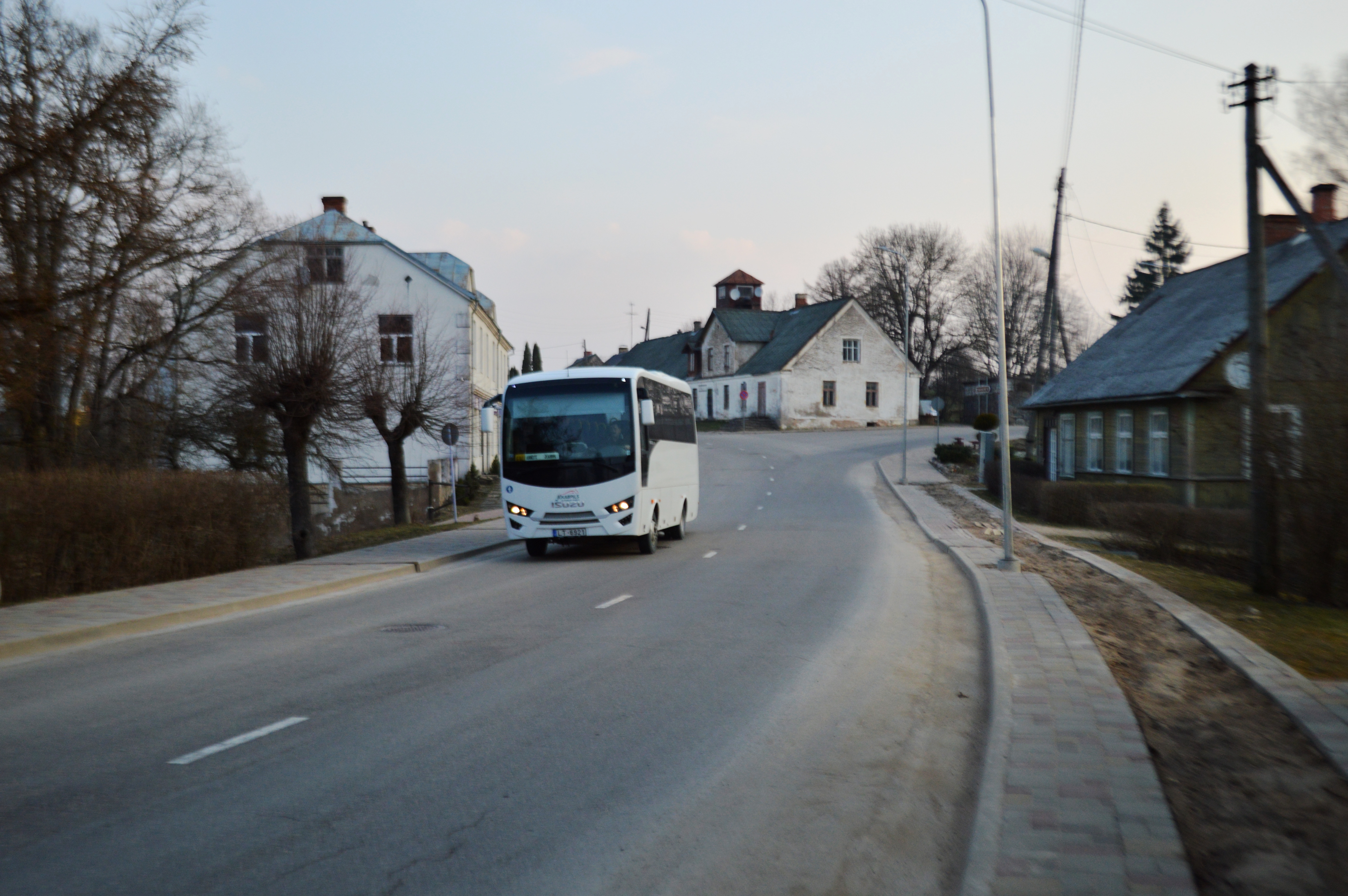 Latgaļu: Aotobuss Akneiša–Jākubpiļs Vīseitē izbrauc nu autostacejis.